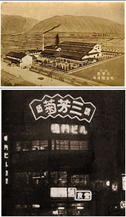 明治〜大正の三芳菊酒造と昭和32年徳島駅前広場の三芳菊ネオンサイン